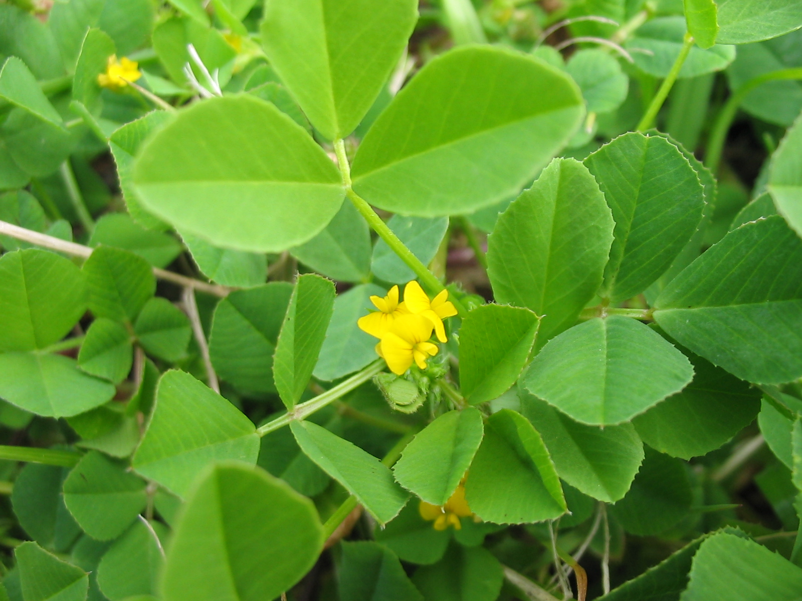 Rauer Schneckenklee (Medicago polymorpha) - Flower